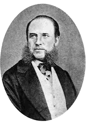 Микола Олександрович Новосельський